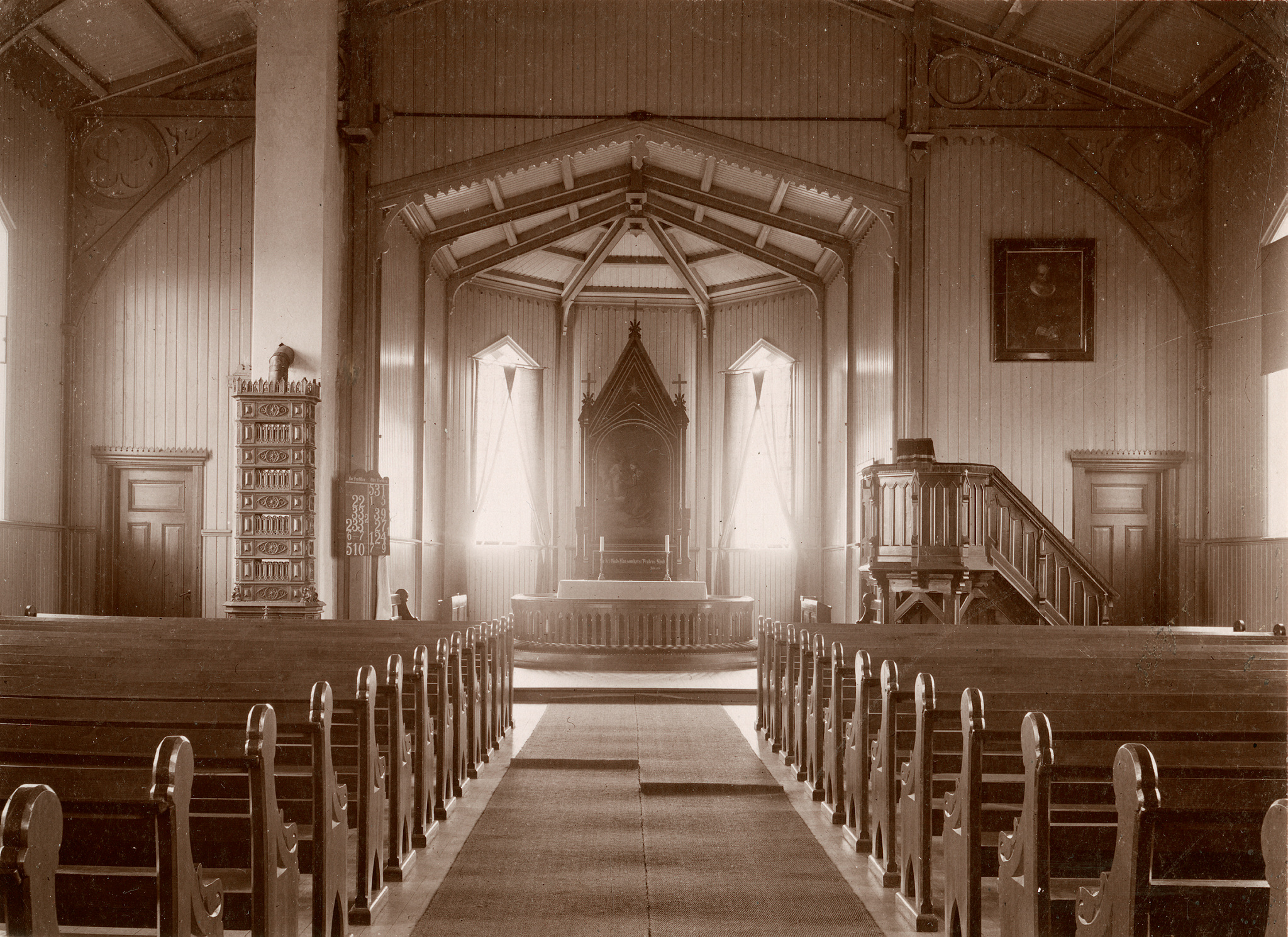 Interiør i Blaker kirke, tilsynelatende før Domenico Erdmanns restaurering i 1931. Ukjent fotograf, fra Riksantikvarens Kulturminnebilder.no.